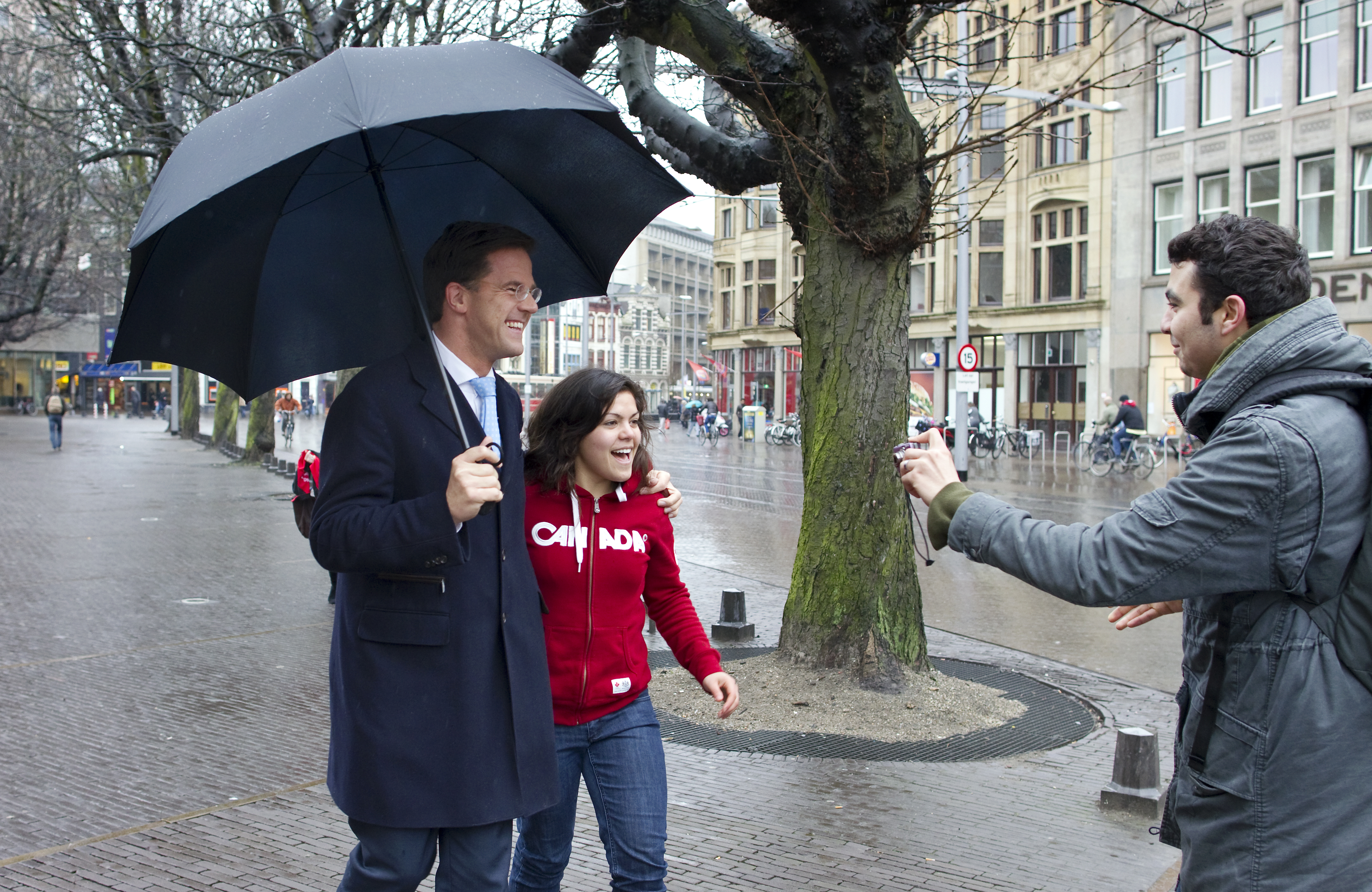 Minister-president Rutte vindt tijdens zijn wandeling naar de Haagse studio’s van de NOS een moment voor een fotootje.